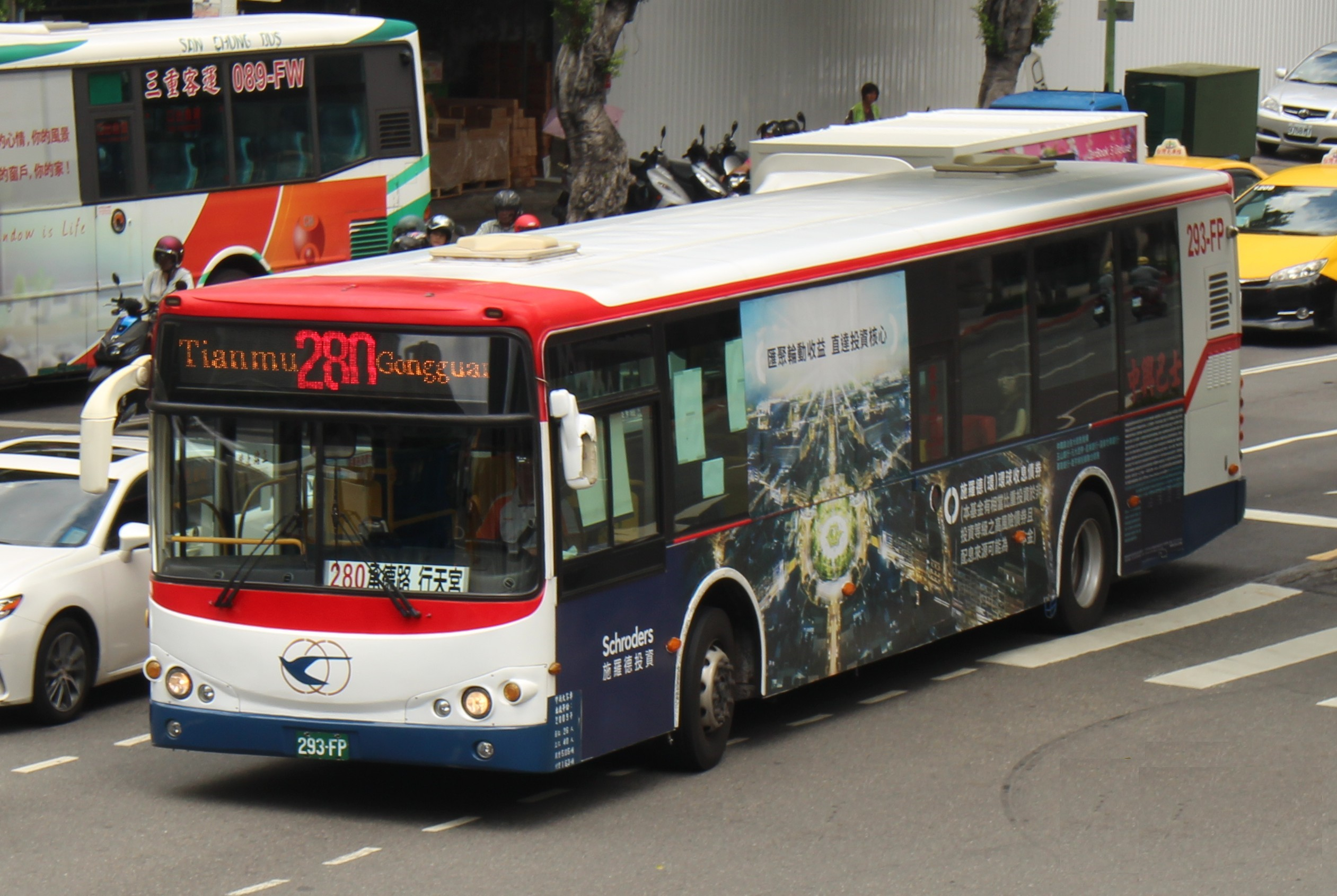 中興巴士2010 KINGLONG KL6120U1四期 293-FP 280